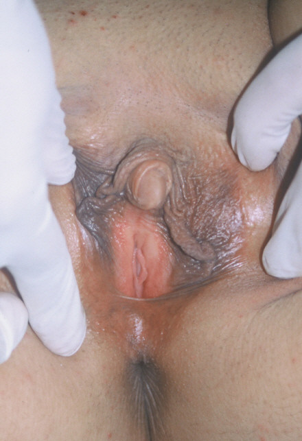 clitoromagaly